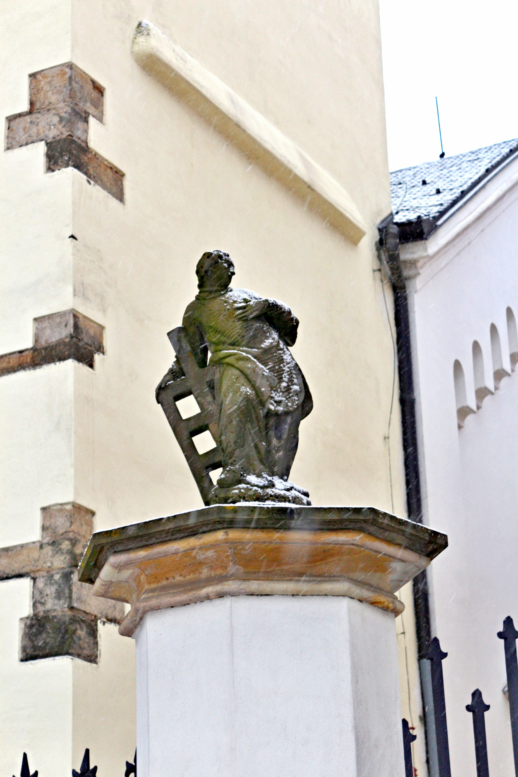 Dolní Počernice, kostel Nanebevzetí Panny Marie